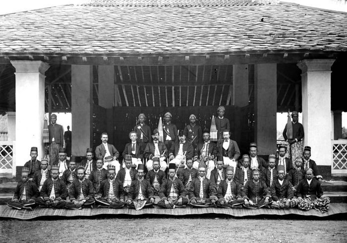 Negatief. Onder de Regent diende in ieder Regentschap een groot aantal lagere inheemse functionarissen. Deze hele groep, met inbegrip van de Regent, werd aangeduid met de term 'inlandse hoofden', ook wel kortweg 'hoofden', zoals in Max Havelaars 'toespraak tot de hoofden van Lebak'. Het ging hier om forse aantallen. Elke Residentie bestond uit meerdere Regentschappen, die op hun beurt weer onderverdeeld waren in districten en onderdistricten. Rond 1900 waren er zo'n 400 districten en dus ook districtshoofden (wedana) op Java. (P. Boomgaard, 2001). Staatsieportret van het Inlands Bestuur van Kraksaän bij Probolinggo Inlands bestuur, Kraksaän, Probolinggo, ca. 1885